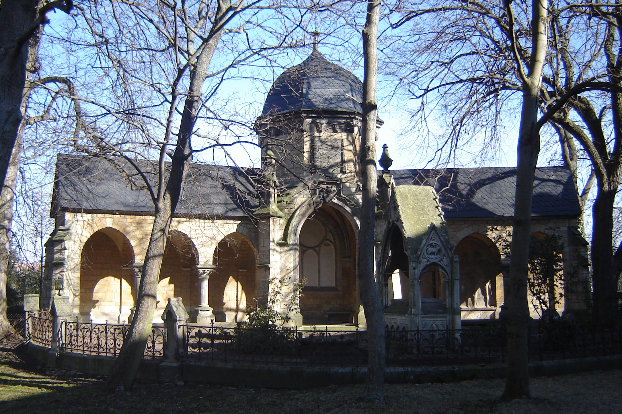 Neugattersleben, Sachsen-Anhalt, Deutschland,Erbbegräbnis v. Alvensleben